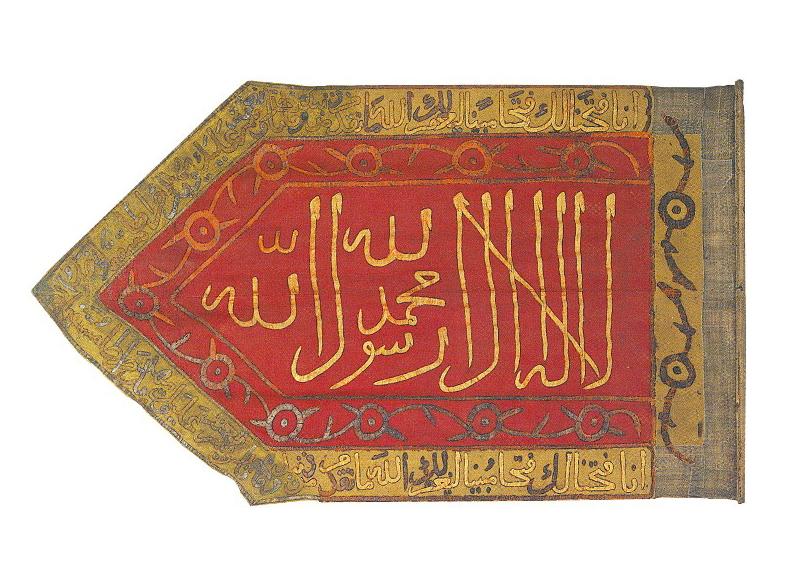 Türkische Standarte im Heeresgeschichtlichen Museum, erbeutet bei der Schlacht am Kahlenberg 1683.